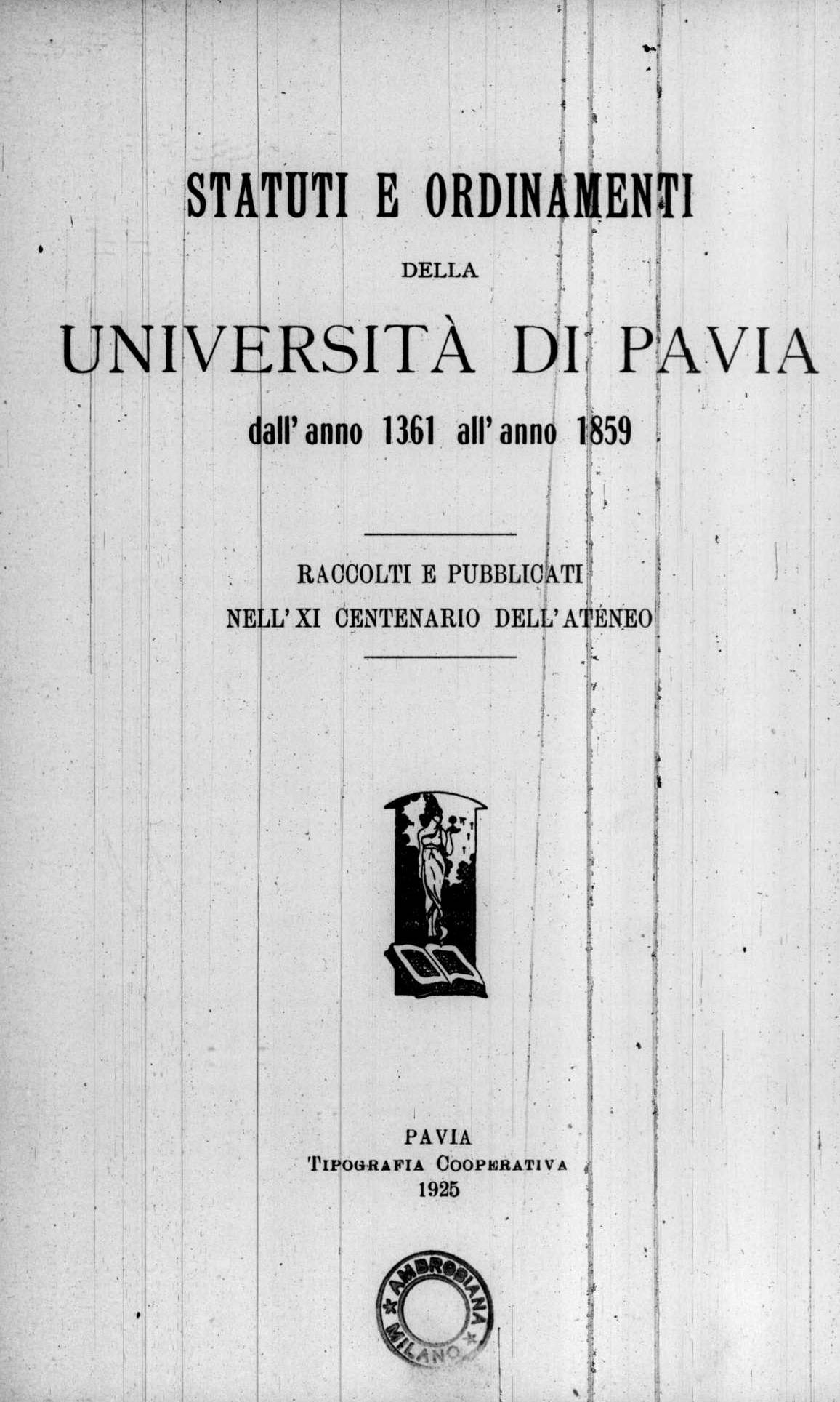 Frontespizio